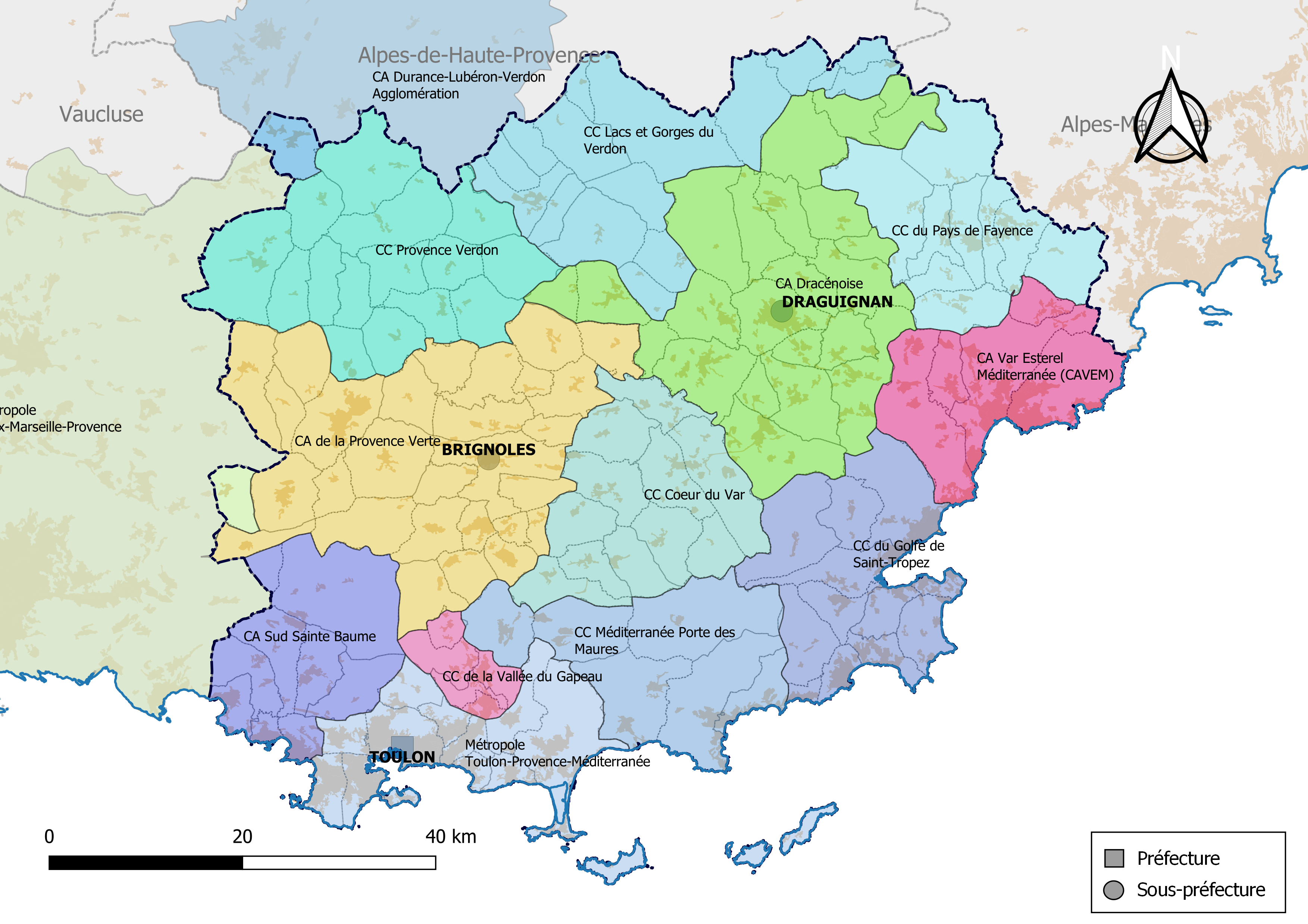 Carte des intercommunalités du département du Var, France. Composition au 1er janvier 2019.